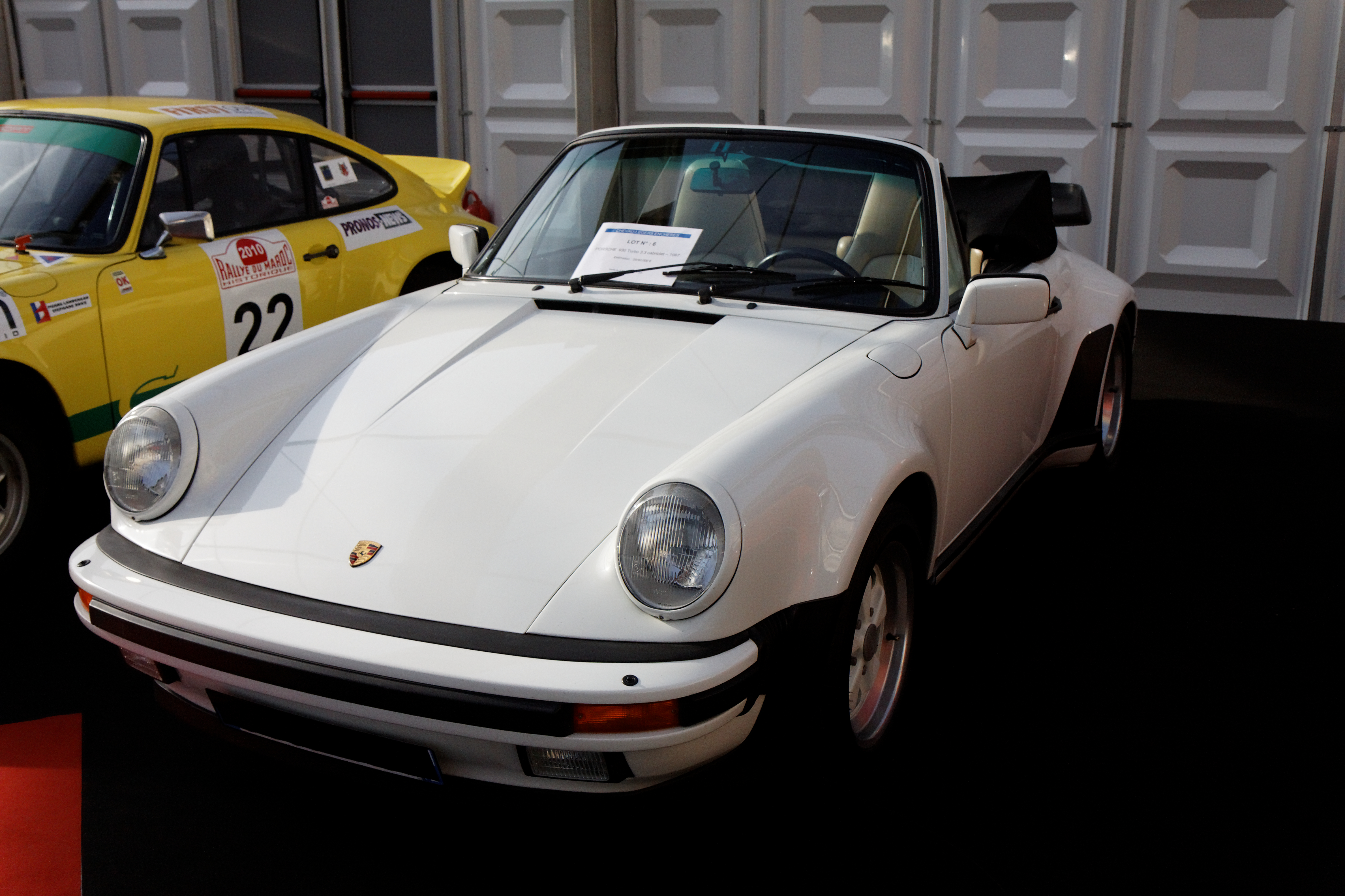 Porsche 930 - Festival Automobile International 2011 - Vente aux enchères